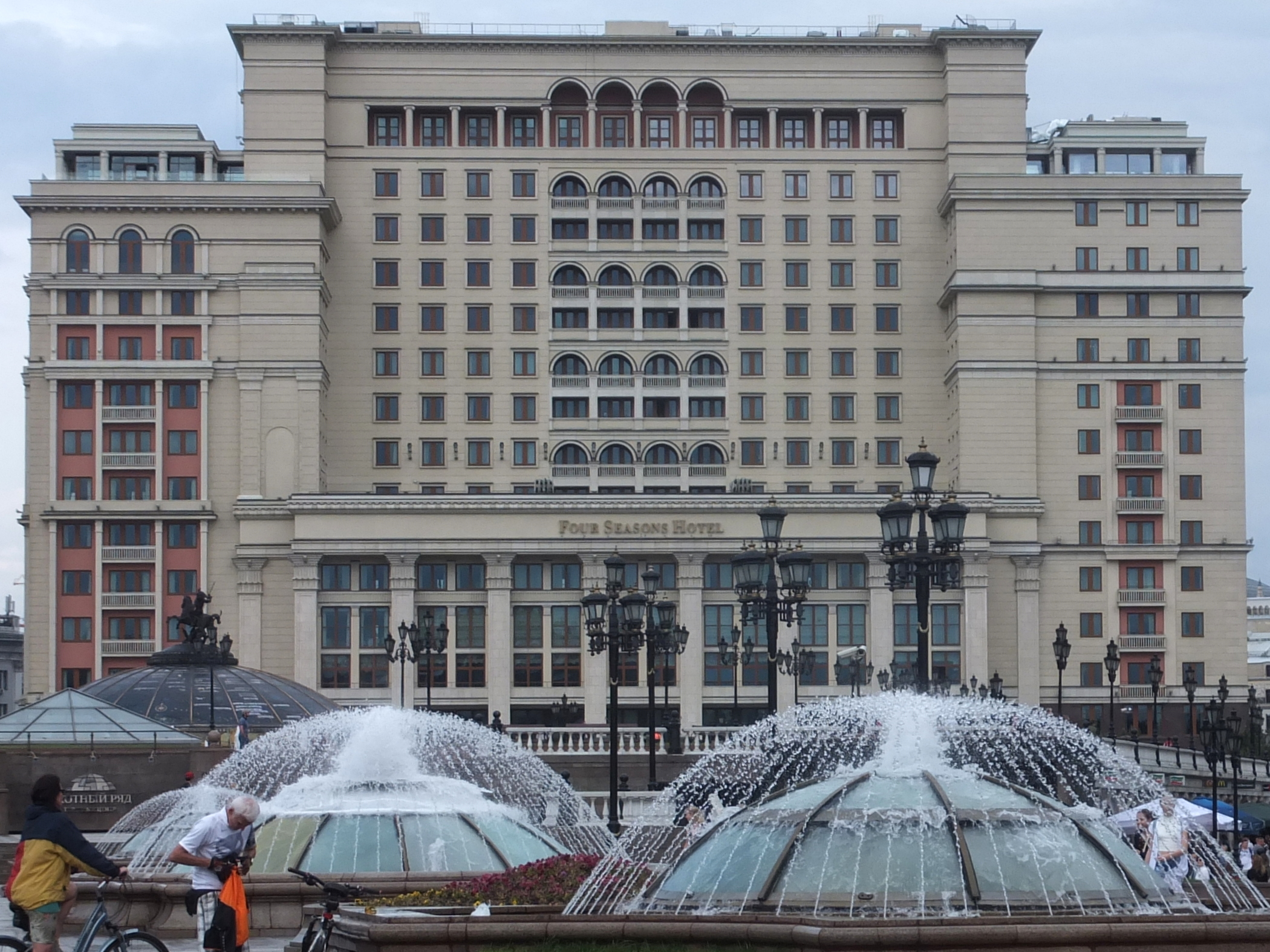 Four Seasons Hotel Moscow (2016)